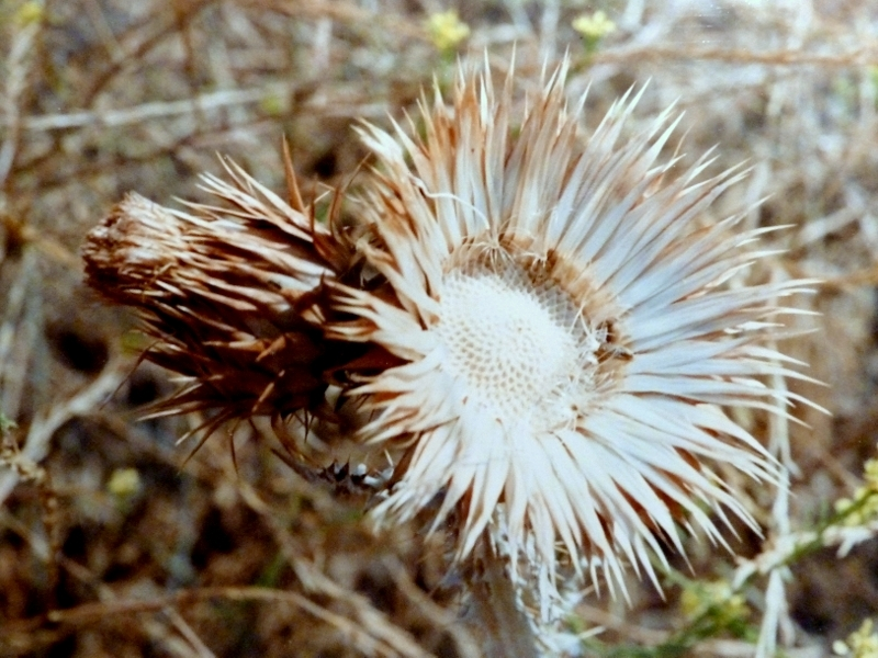 Onopordum illyricum (Cardo borriquero) - Receptáculo de un capítulo post-antesis con aquenios in situ - Prado de Rejas, Madrid, España).